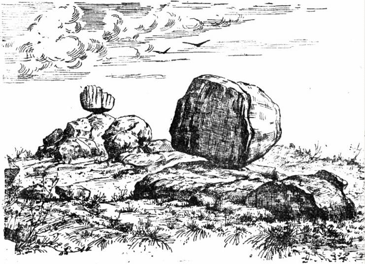 Dessin de Honoré Jacquinot de 1886, paru dans les Bulletins de la Société d'anthropologie de Paris et représentant la Griffe du Diable et la Pierre qui croule à Dettey (Saône-et-Loire, France)